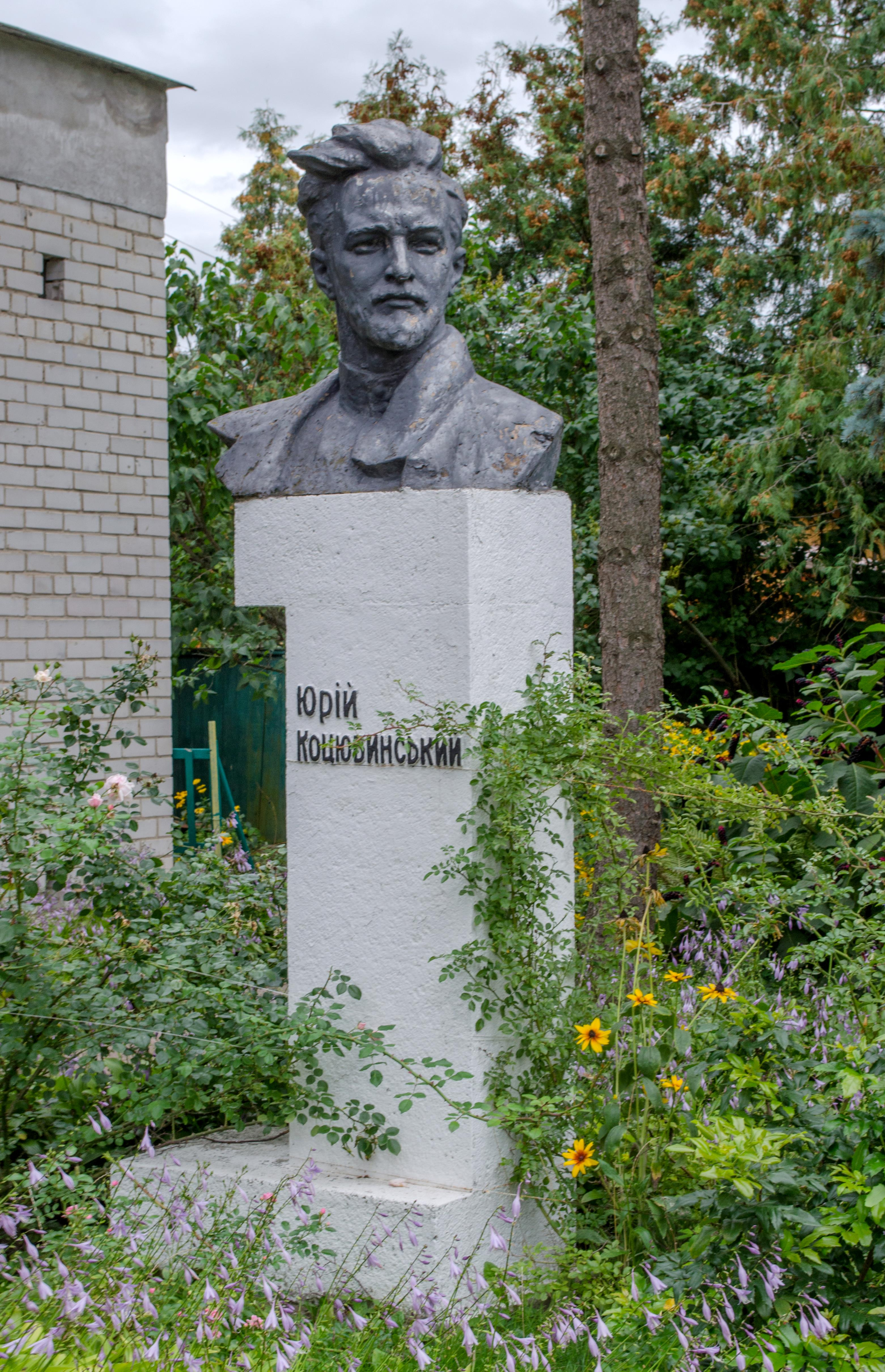 Пам’ятник Ю. Коцюбинському, Чернігів, вул. Коцюбинського, 3